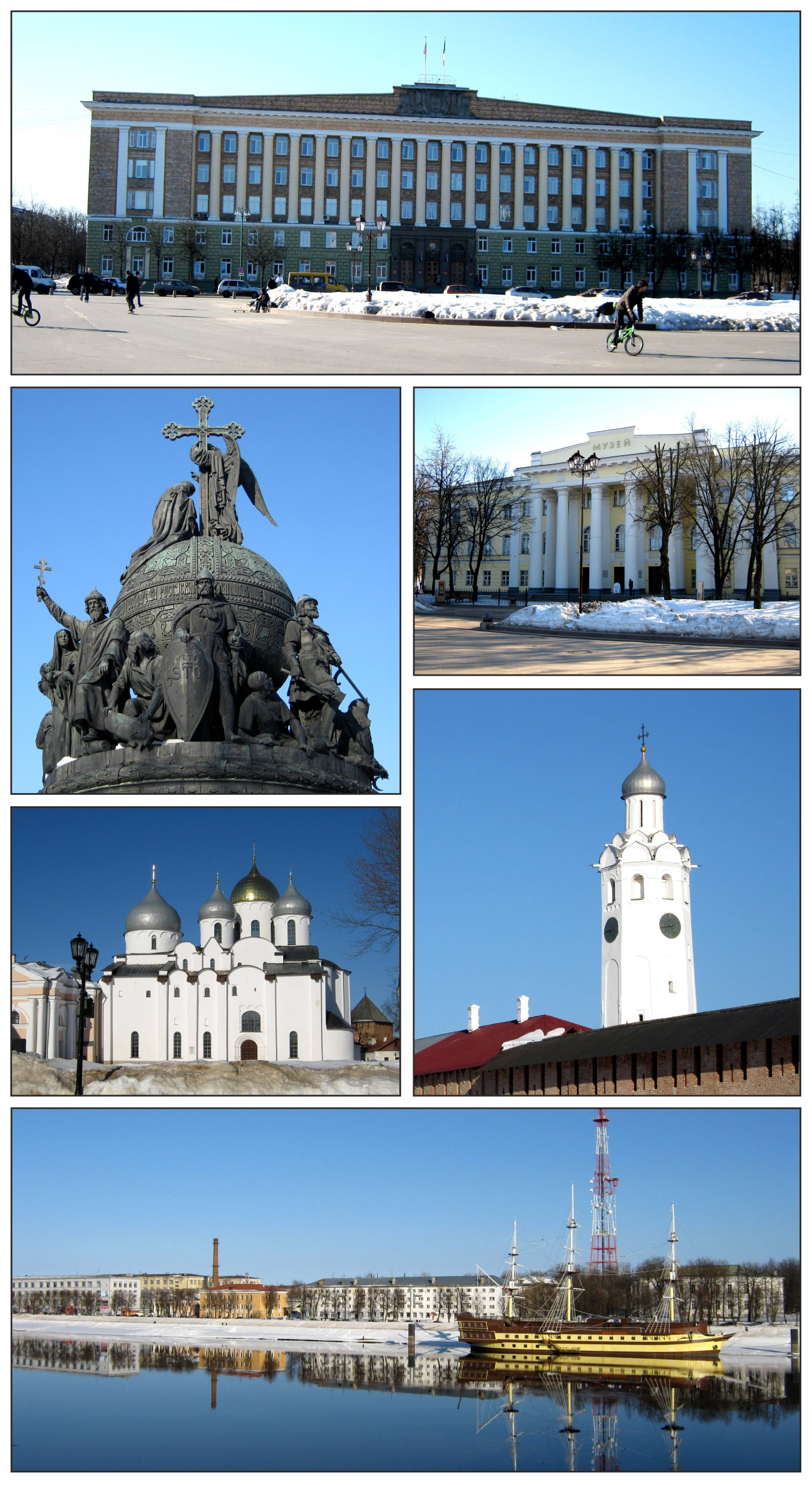 Коллаж из фотографий собственной съёмки.